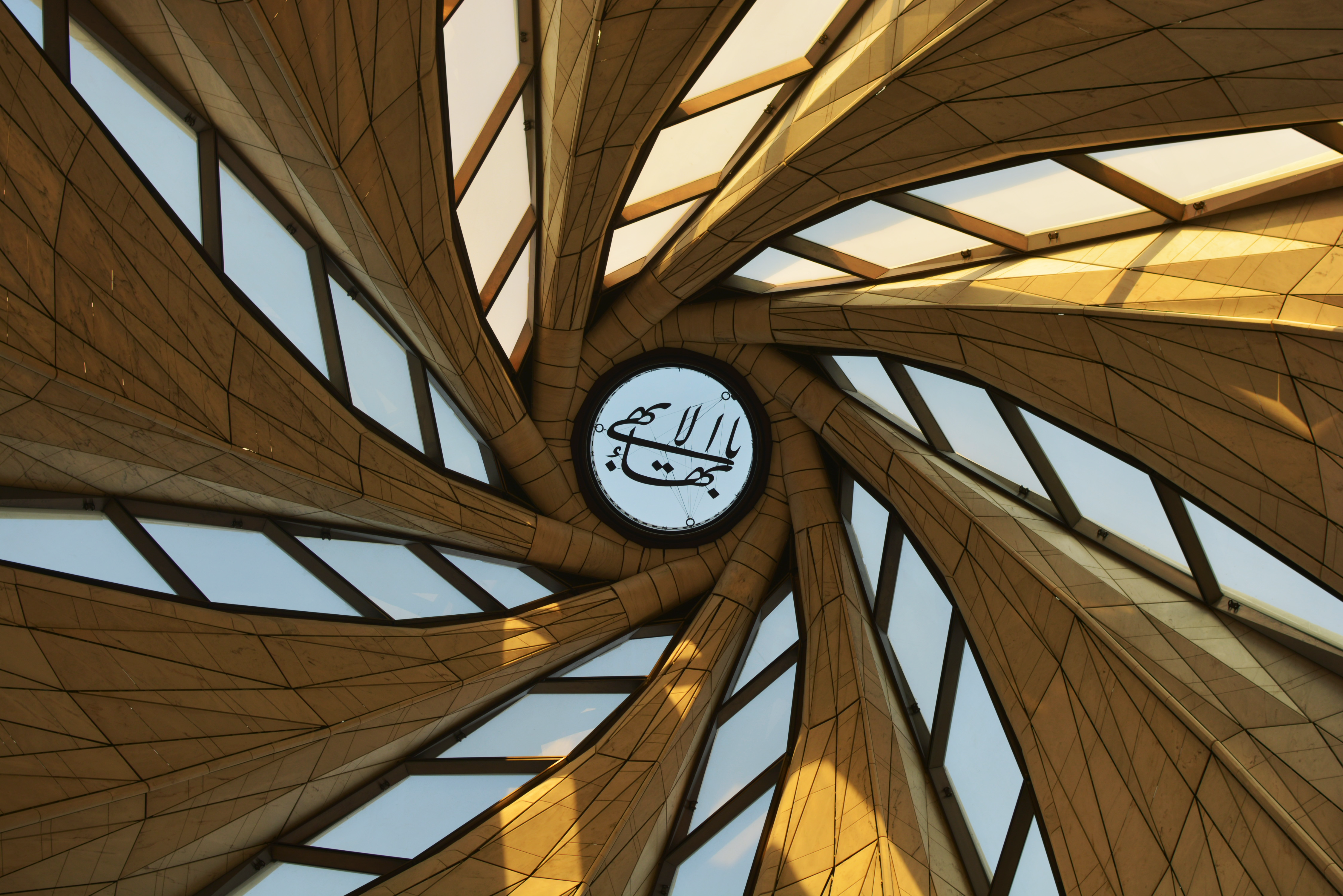 Vista de la cúpula con El Más Grande Nombre